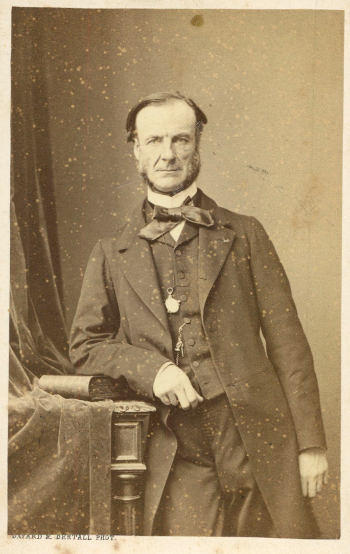 Portrait d'Eugène Lefébure de Fourcy en 1861.